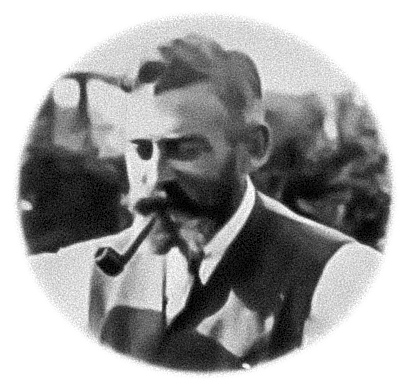 Auto retrato tomado en alrededores de Magallanes.